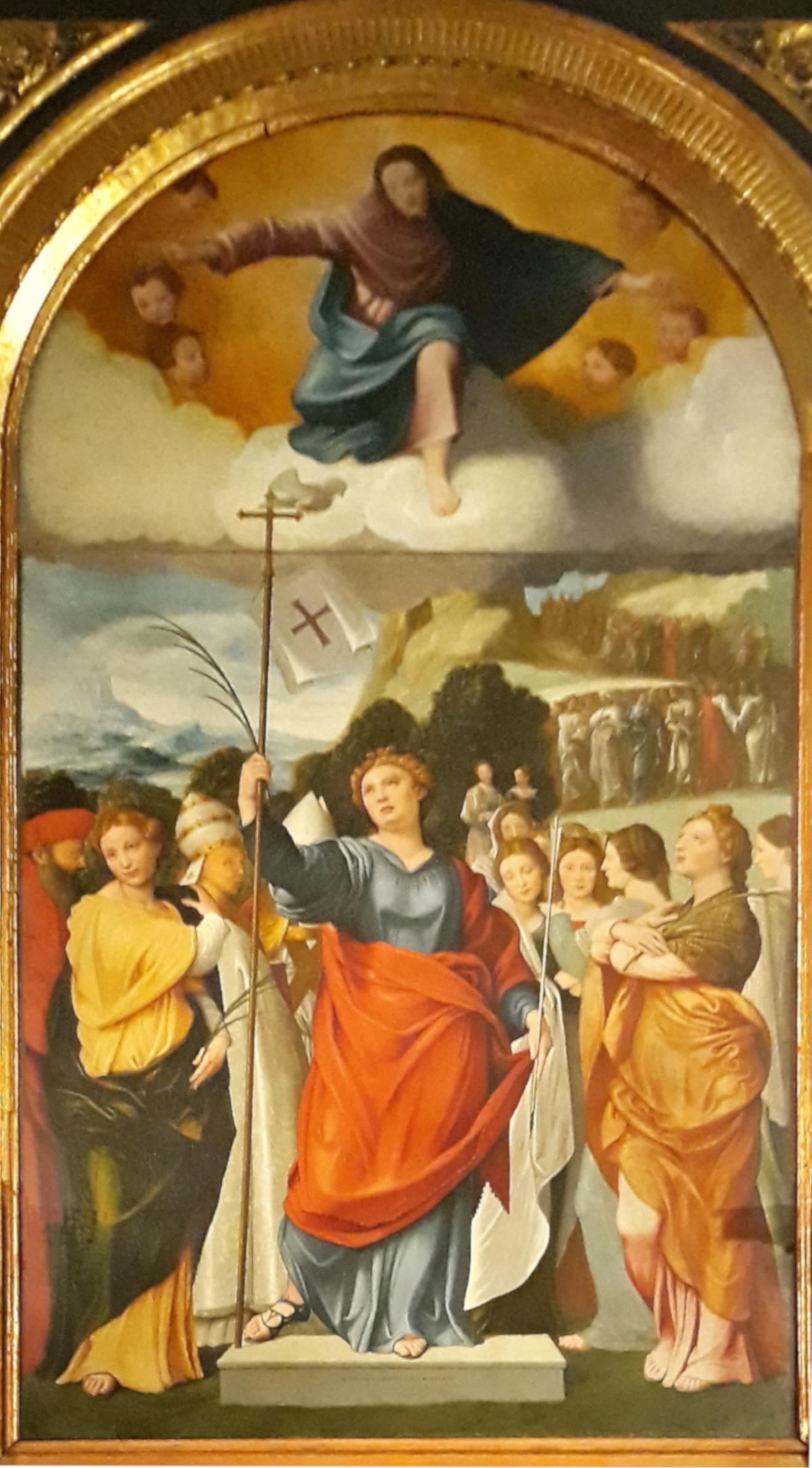 Giovan Francesco Caroto "Sant'Orsola", tela dell'altare minore di sinistra della chiesa di San Giorgio in Braida a Verona